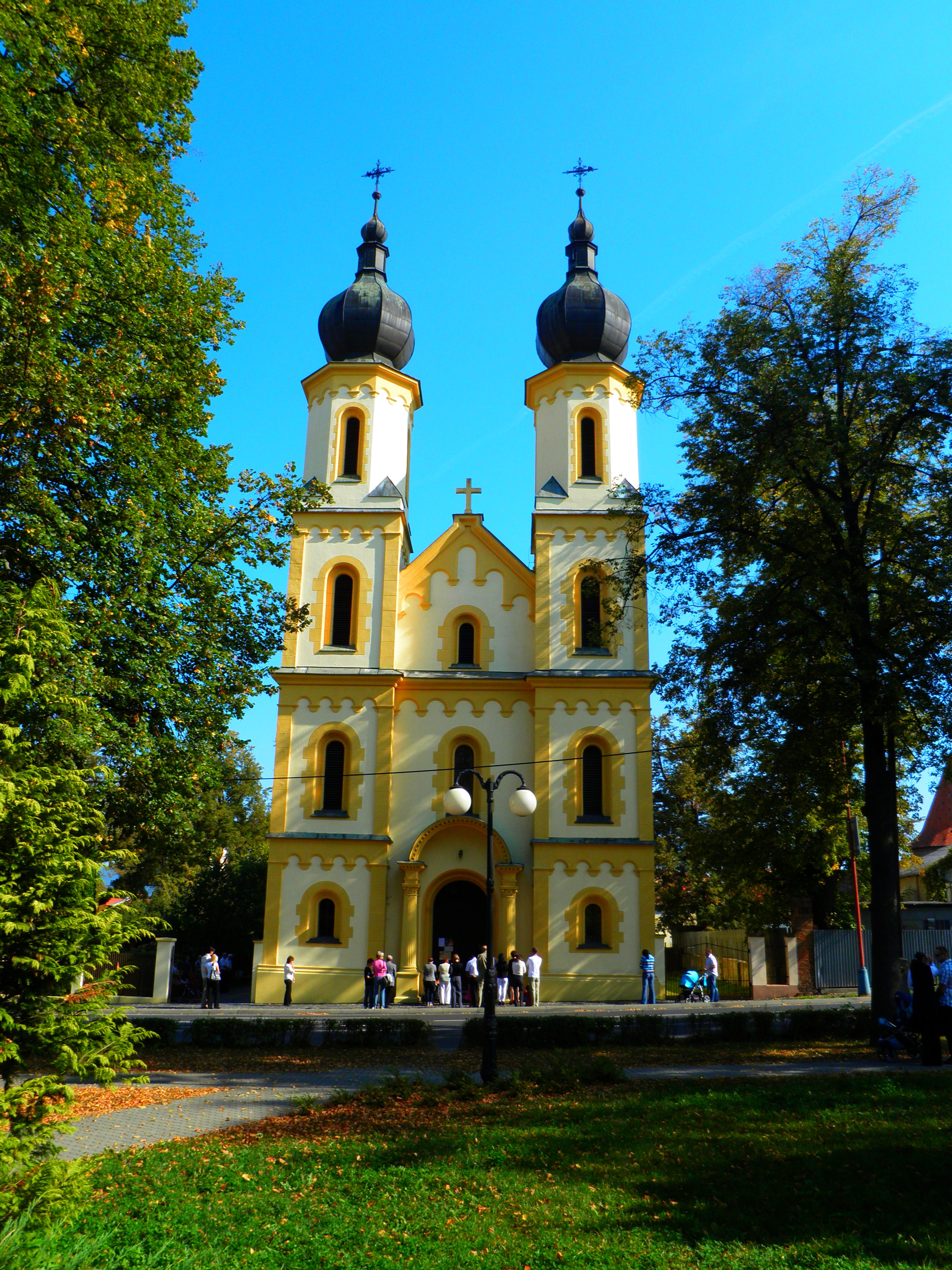 Kostol s. Petra a Pavla